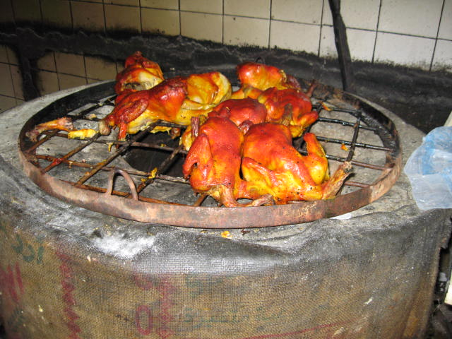 صورة للمندي وهي أكلة تقليدية يمنية